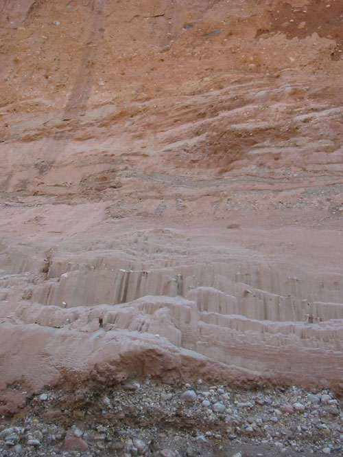 Peamiselt liivast, kruusast ja veeristest koosnevad liustikujõelised setted, mida katab viimase liustiku pealetungi punakaspruun moreen.